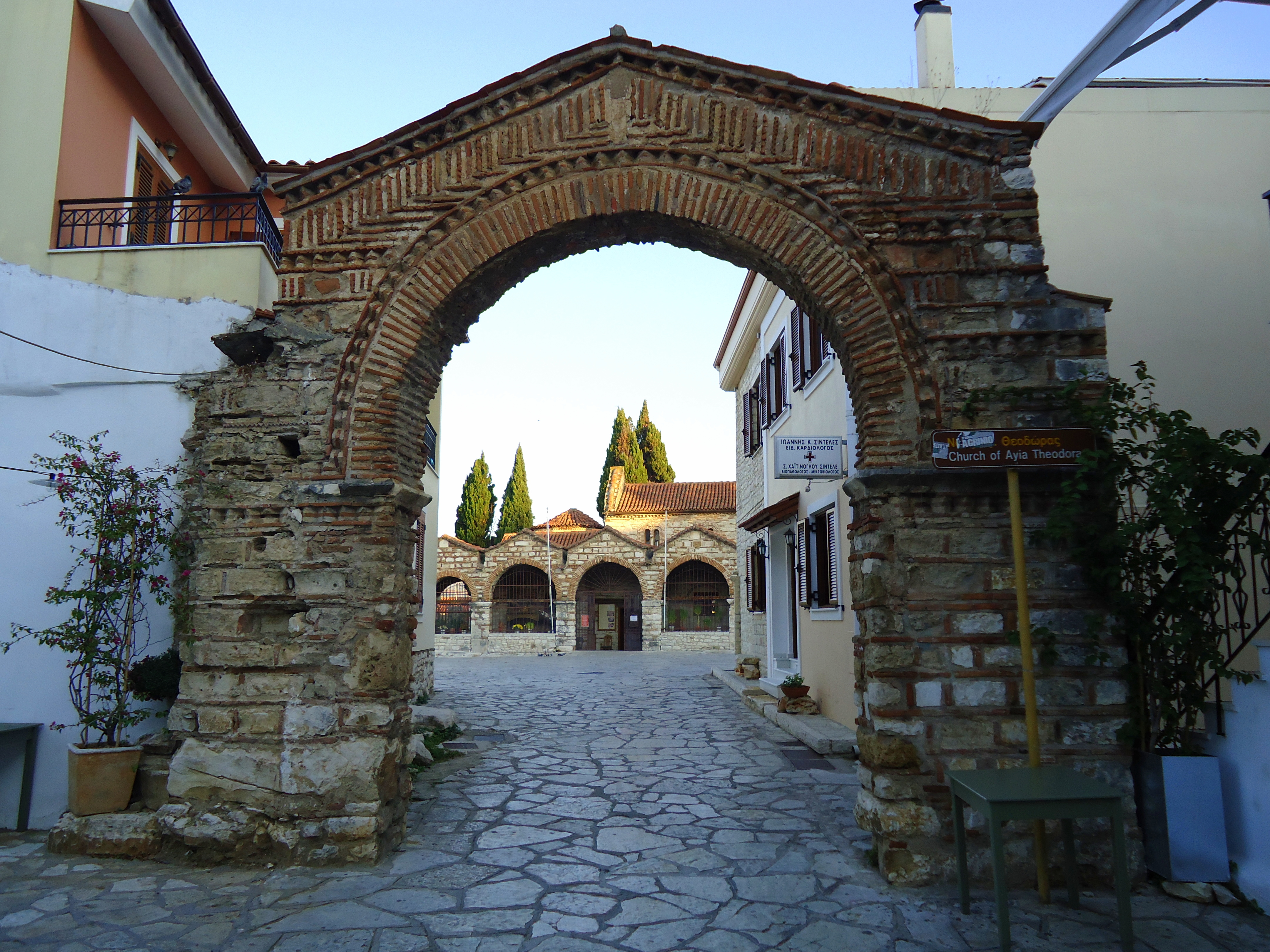 Η Αψίδα της Αγίας Θεοδώρας της Άρτας.